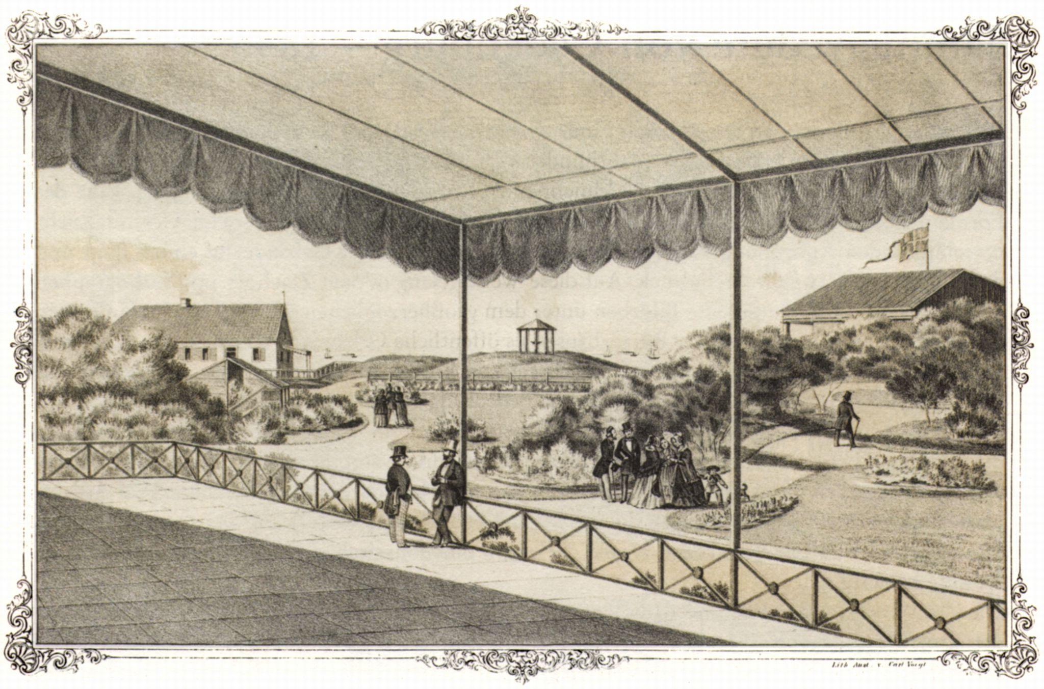 Wangerooge, Konversationshaus, Balustrade, Lithographie von Carl Friedrich Voigt, 33,3 × 49 cm, erschienen beim Verlag von Ferdinand Schmidt in Oldenburg.